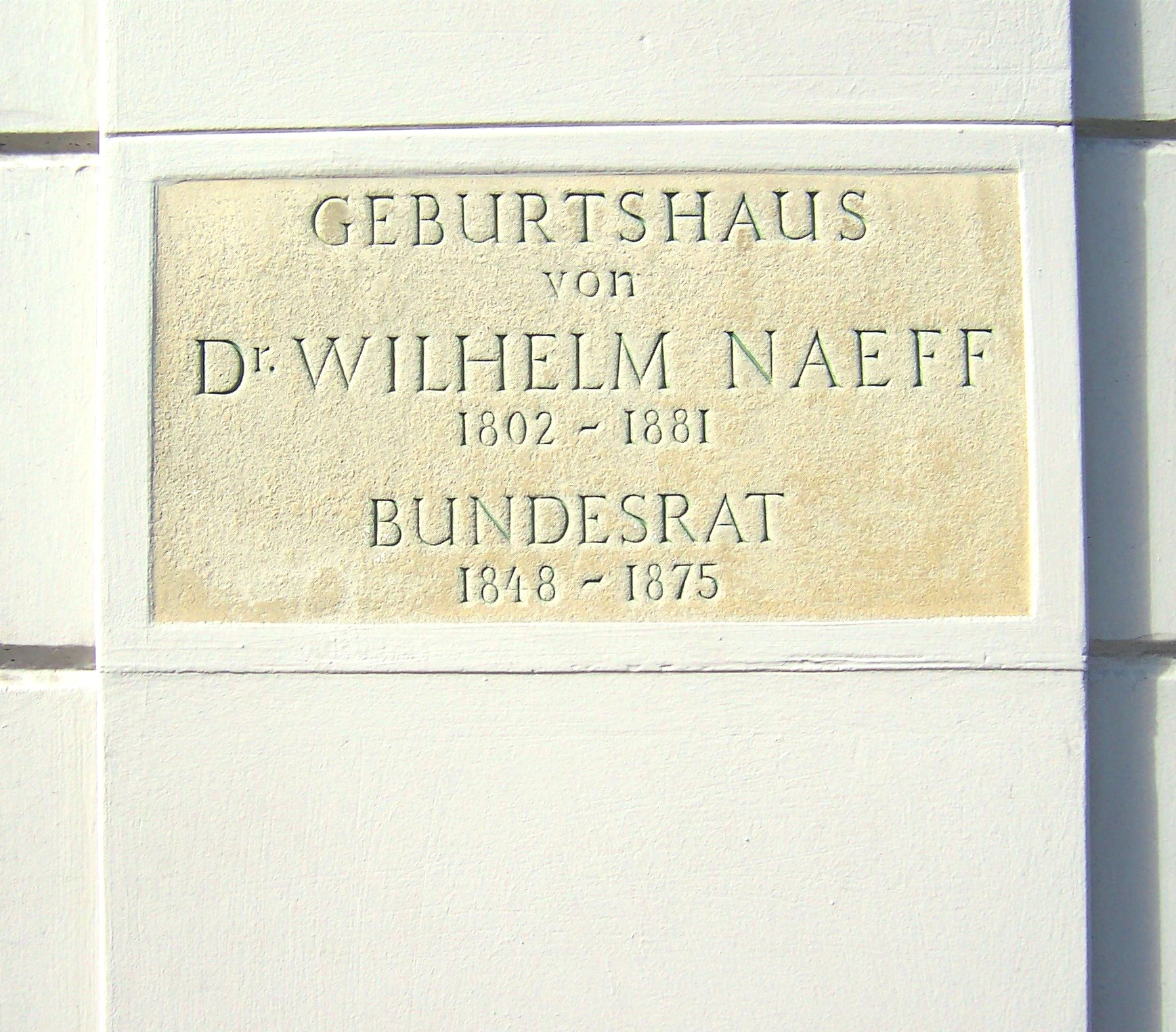 Gedenktafel am Geburtshaus von Bundesrat Wilhelm Matthias Naeff in Altstätten.